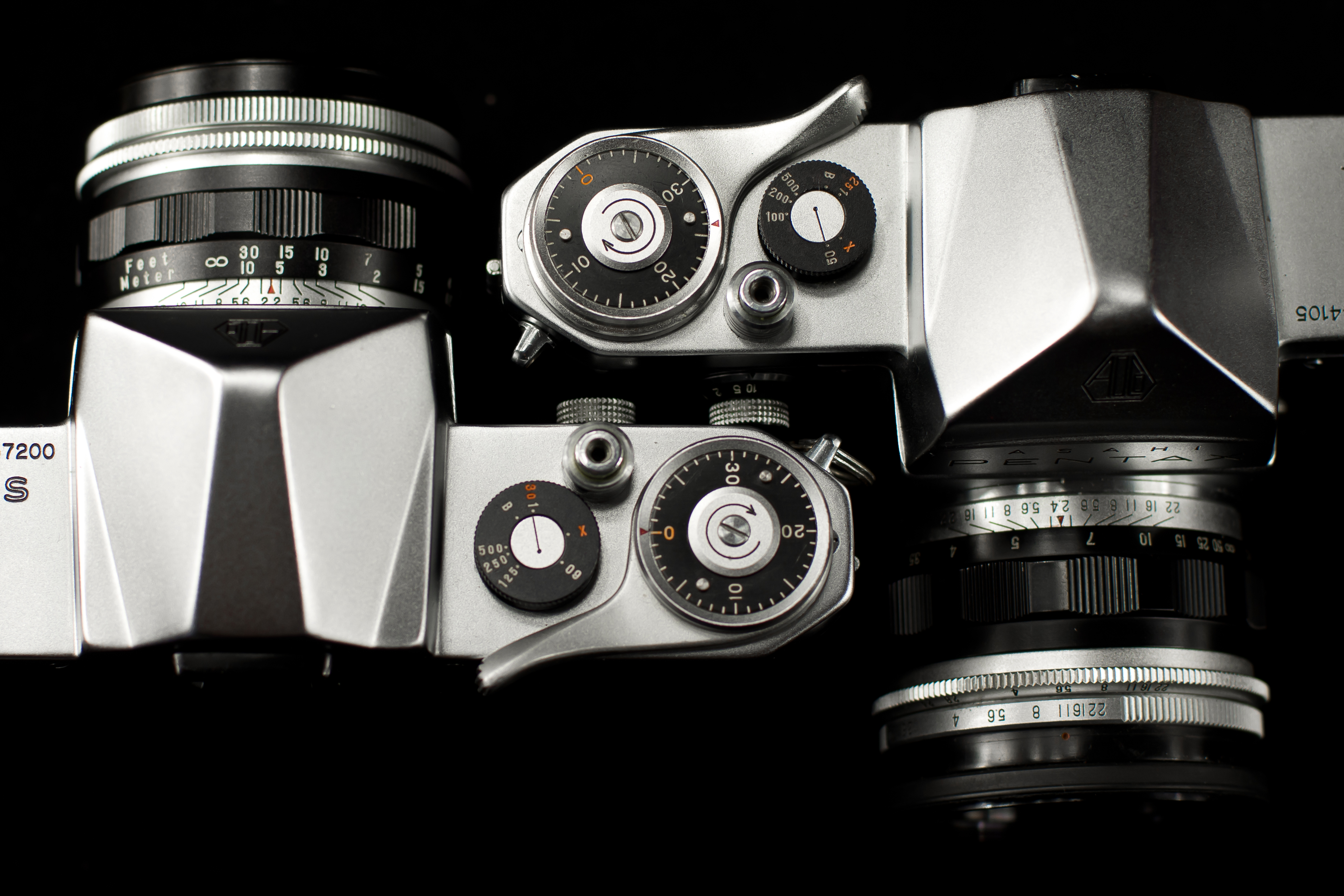 Рычаг взвода и головка выдержек камер Asahi Pentax K и S